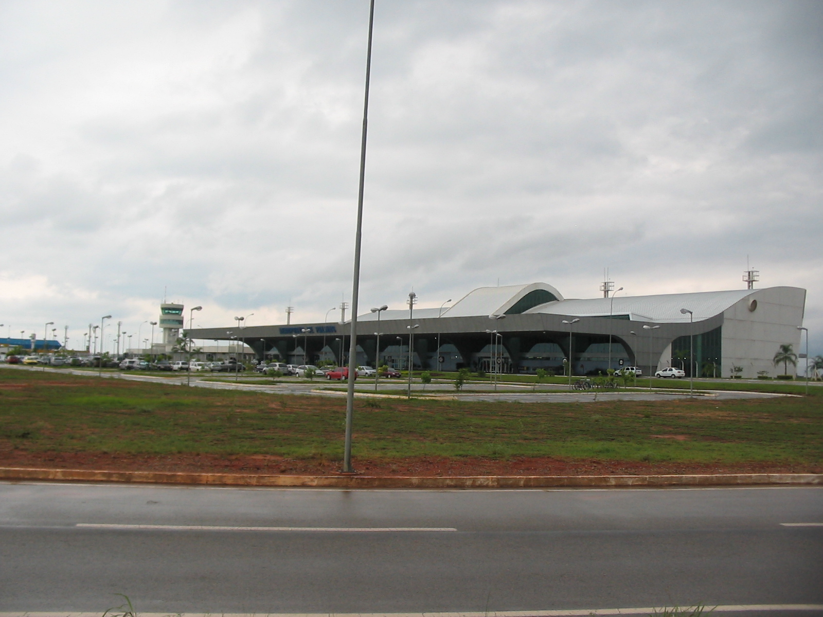 Terminal Aéreo de Palmas, TO, Brasil, aeroporto.